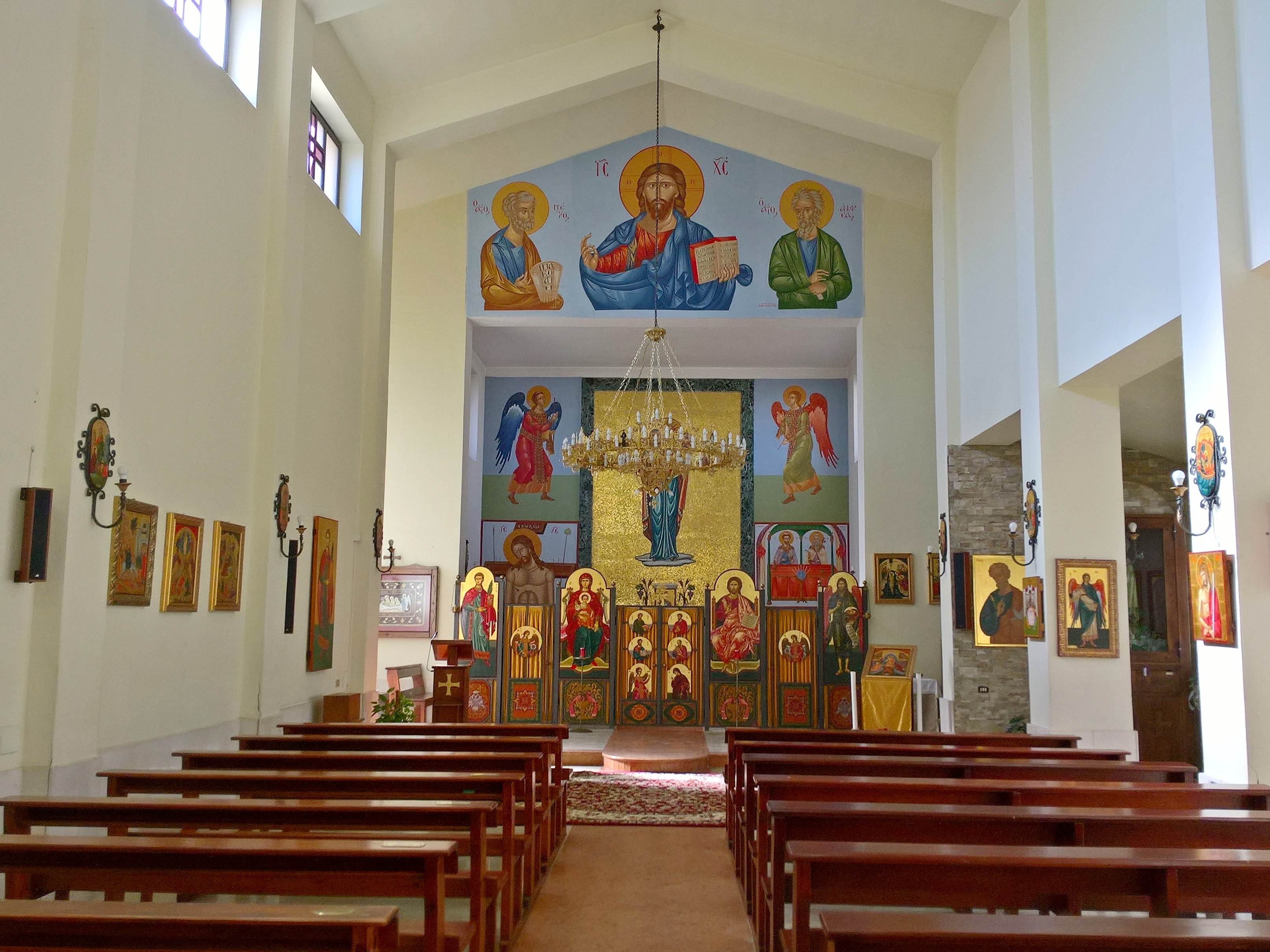 Chiesa San Mauro - vista interna